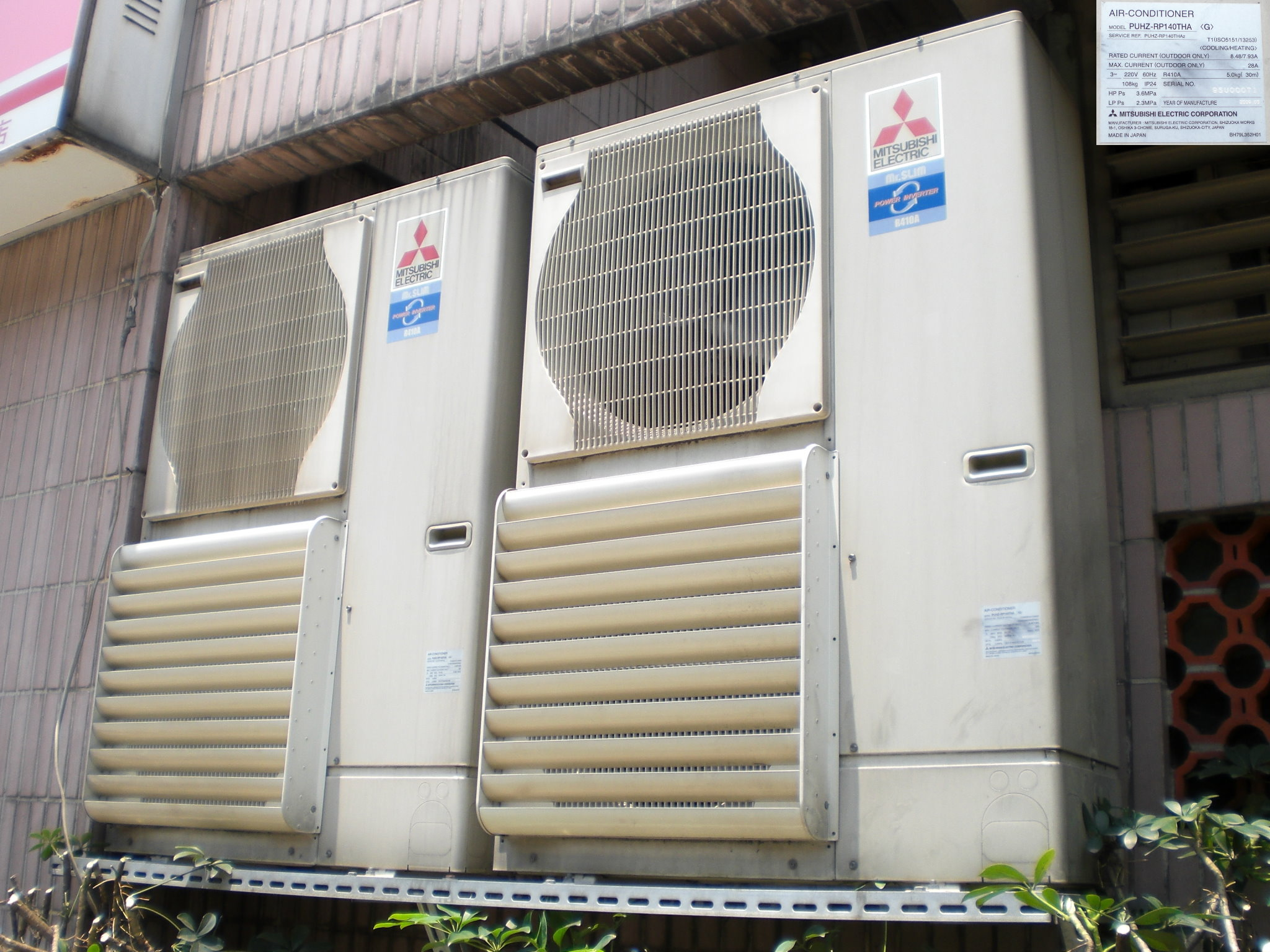 三菱電機商業用冷暖變頻空調室外機PUHZ-RP140THA